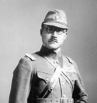 Japanese General Maeda Toshinara